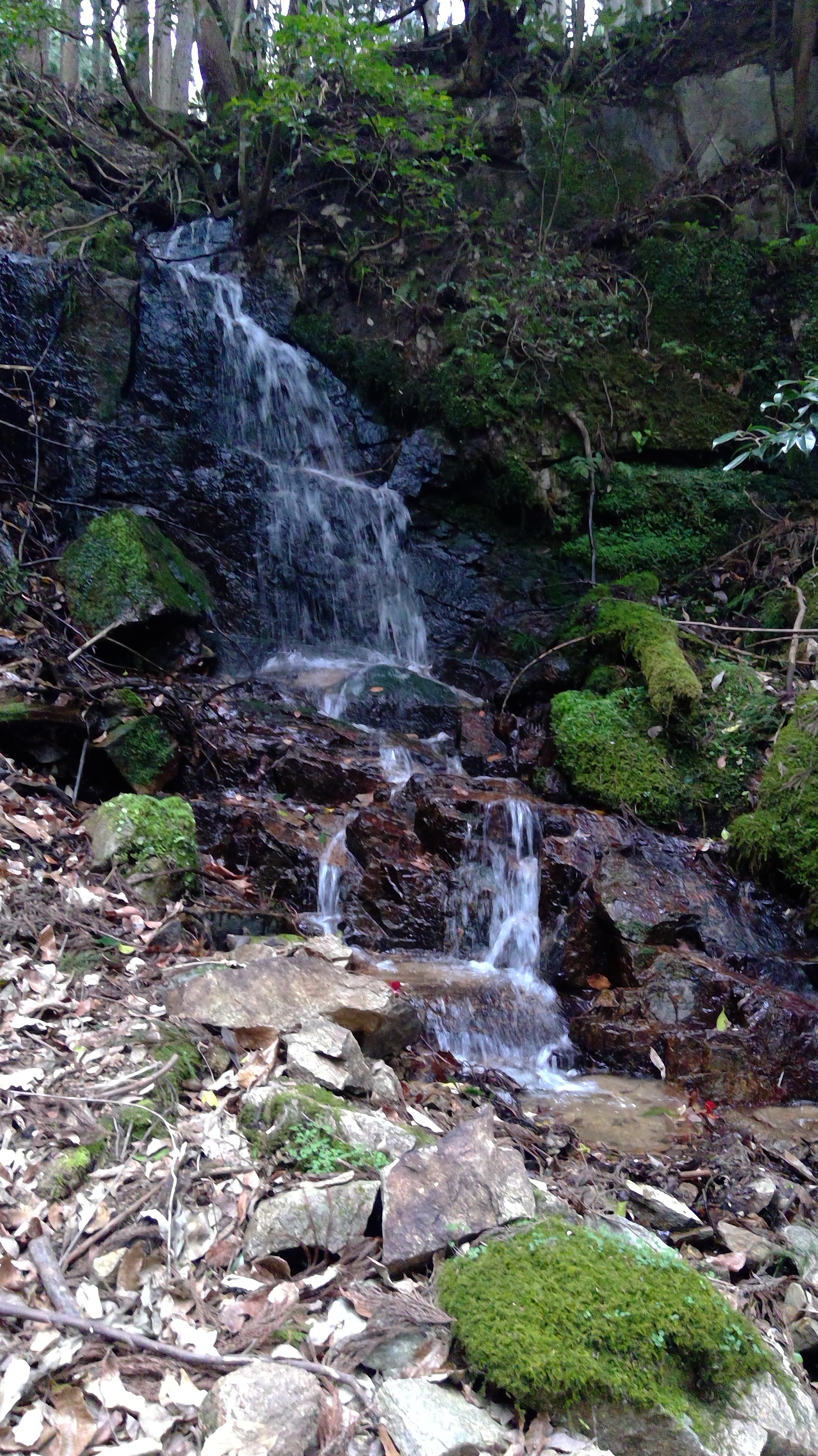 「千年椿」の愛称で親しまれる京都府与謝野町滝にあるヤブツバキの巨木から100メートルほどの場所にある小滝